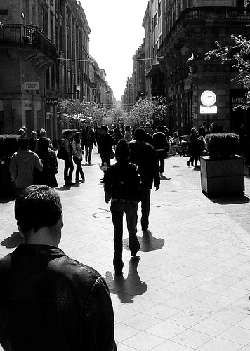 Rue Sainte-Catherine à Bordeaux (photo noir&blanc)